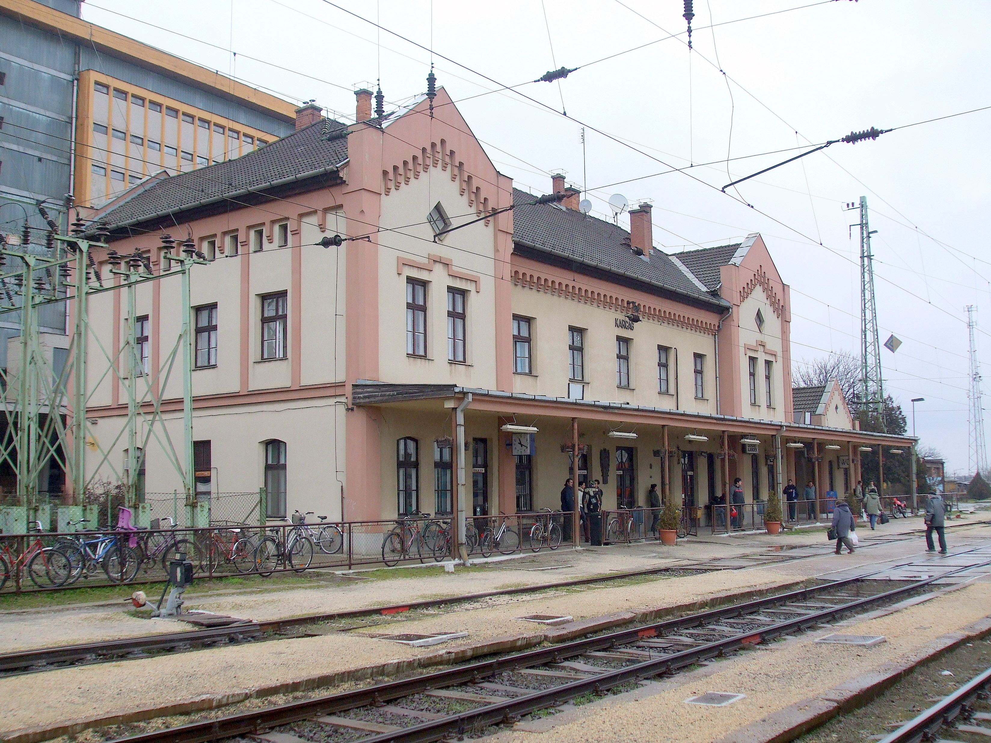 Karcag vasútállomása (Budapest–Szolnok–Debrecen–Nyíregyháza-vasútvonal, Karcag–Tiszafüred-vasútvonal)